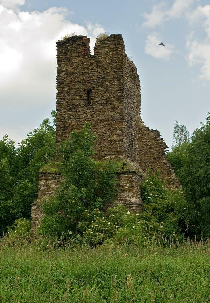 Kościół w Różanej zniszczony w latach wojny trzydziestoletniej, od tamtego czasu w ruinie.